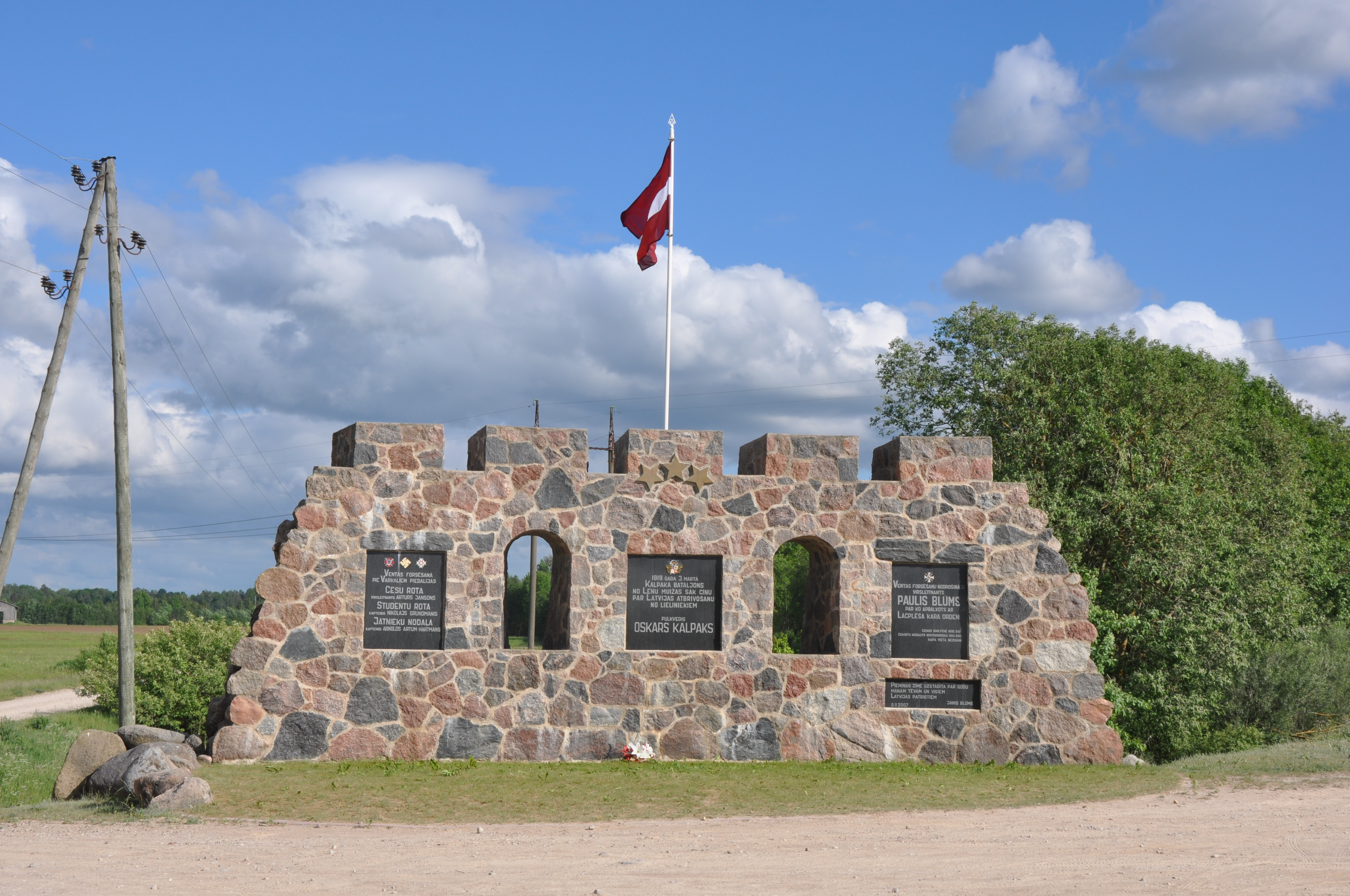 1919.gada 3.martā Kalpaka bataljons no Lēnu muižas sāk cīņu par Latvijas atbrīvošanu no lieliniekiem, Nīkrāces pagasts, Skrundas novads, Latvia.